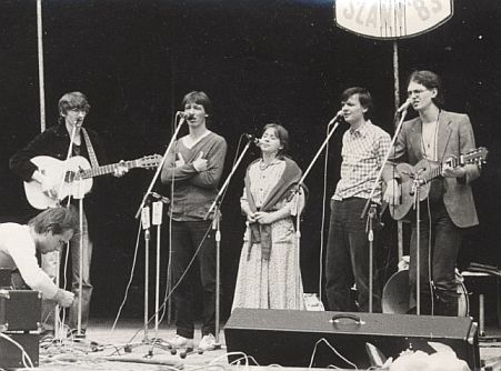 Skupina Jonáš na folkovém festivalu ve Slaném r. 1983. Zleva: J. Sanitrák, V. Ferenčík, M. Kočnarová, O. Žežula, D. Antalík.